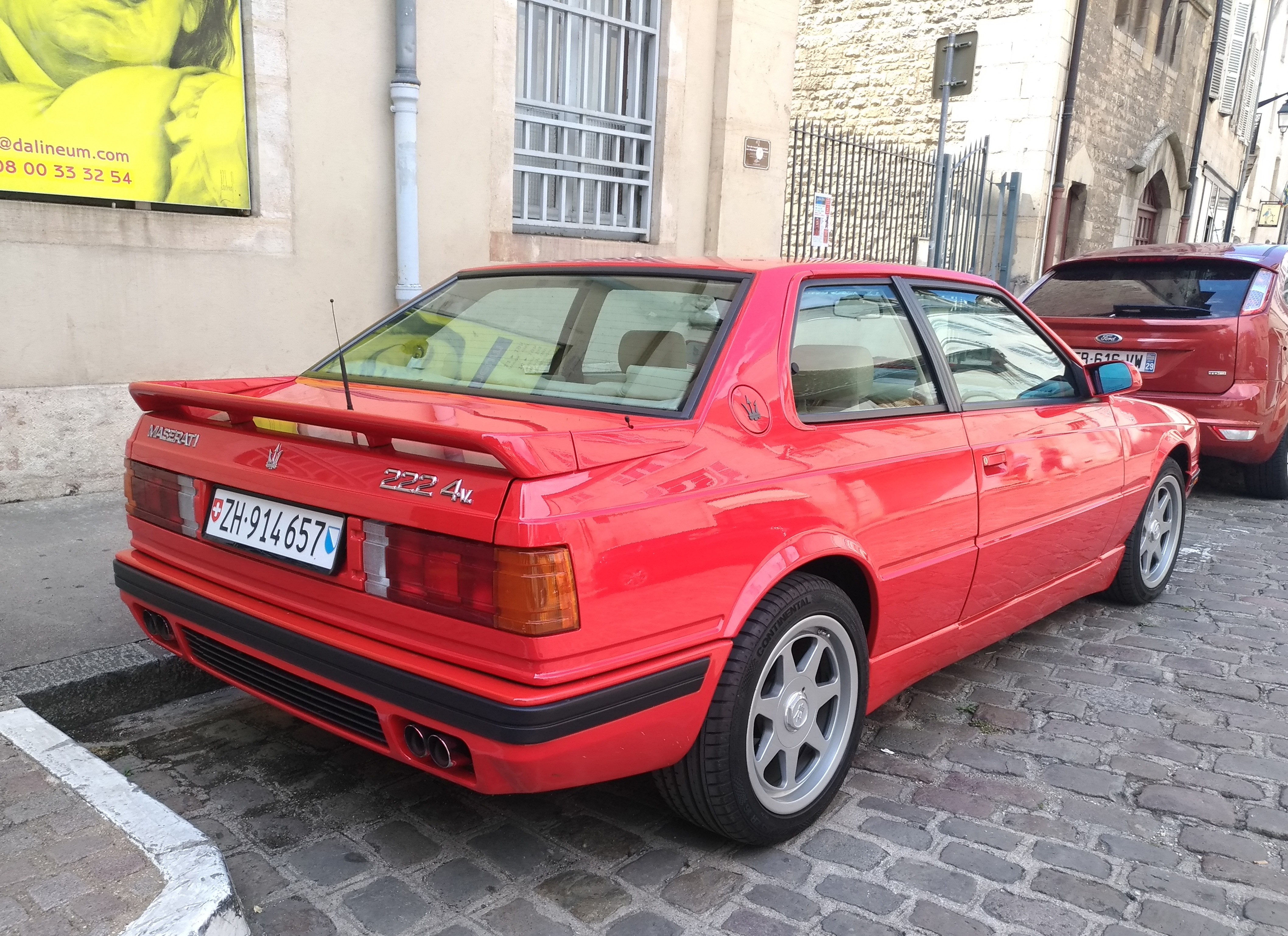 1992 Maserati 222 4V at Beaune